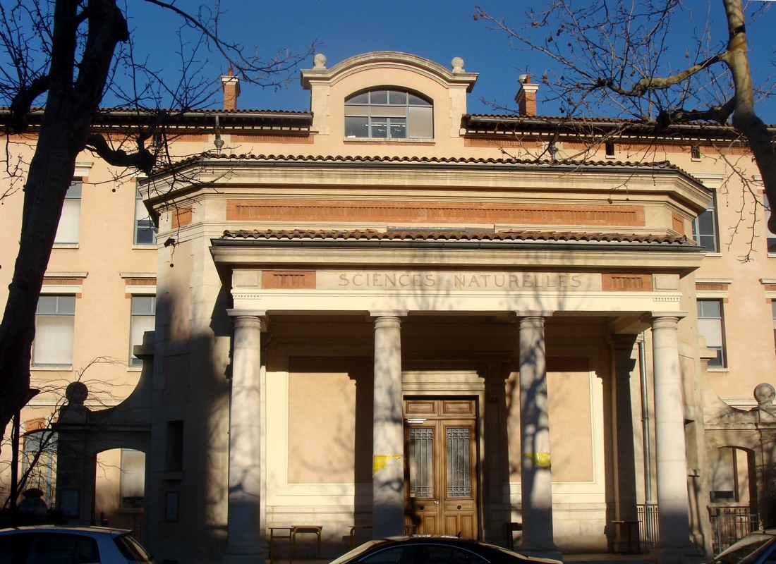 L'amphithéâtre de Sciences naturelles du centre Saint-Charles de l'Université de Provence, construit entre 1911 et 1914, grâce à la ténacité du doyen Léon Charve.